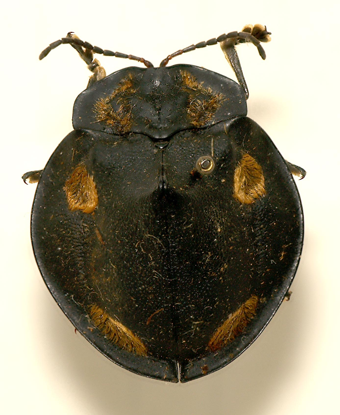 Mesomphalia sexmaculata